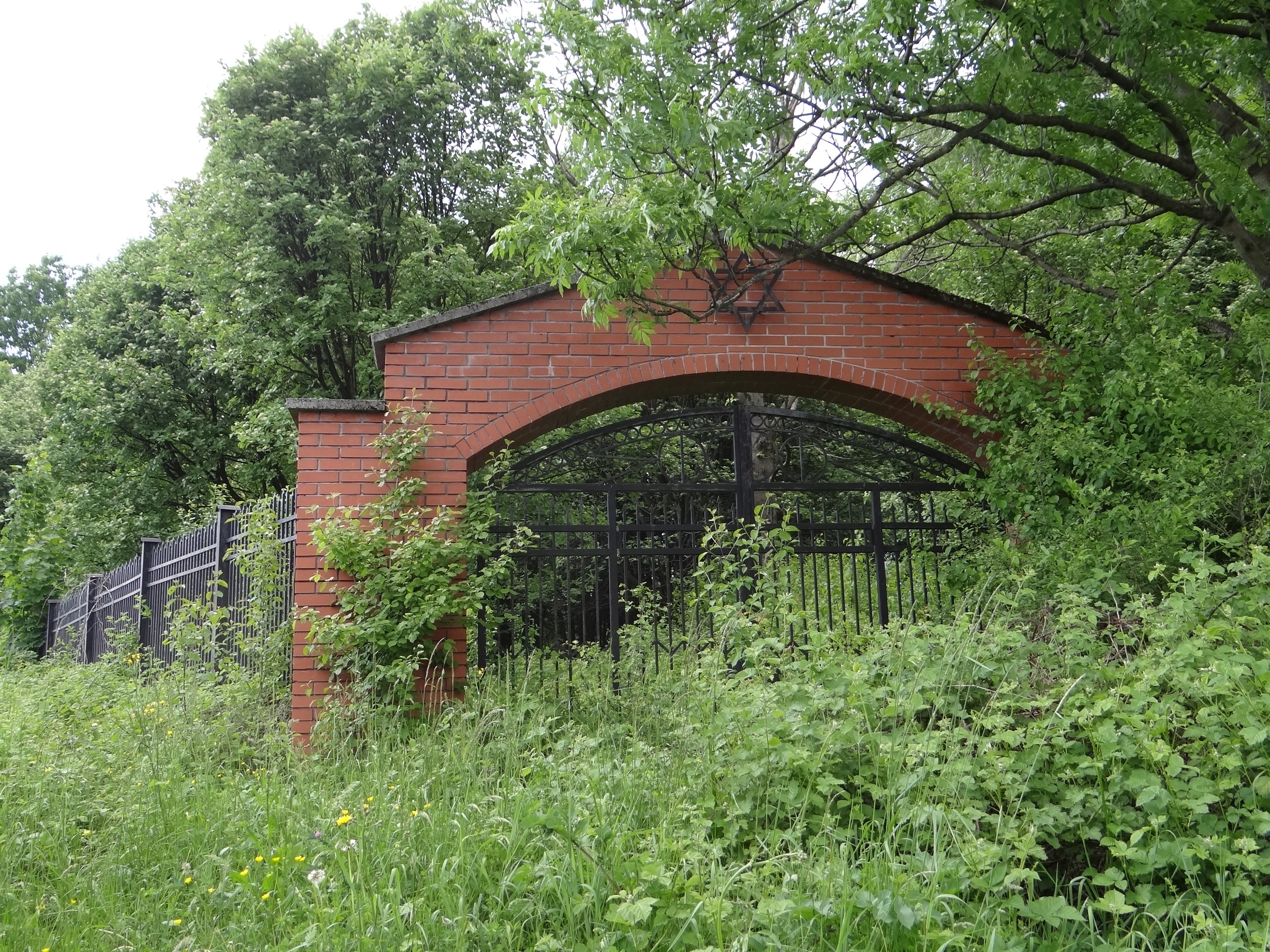 Fragment ogrodzenia kirkuta w Bobowej